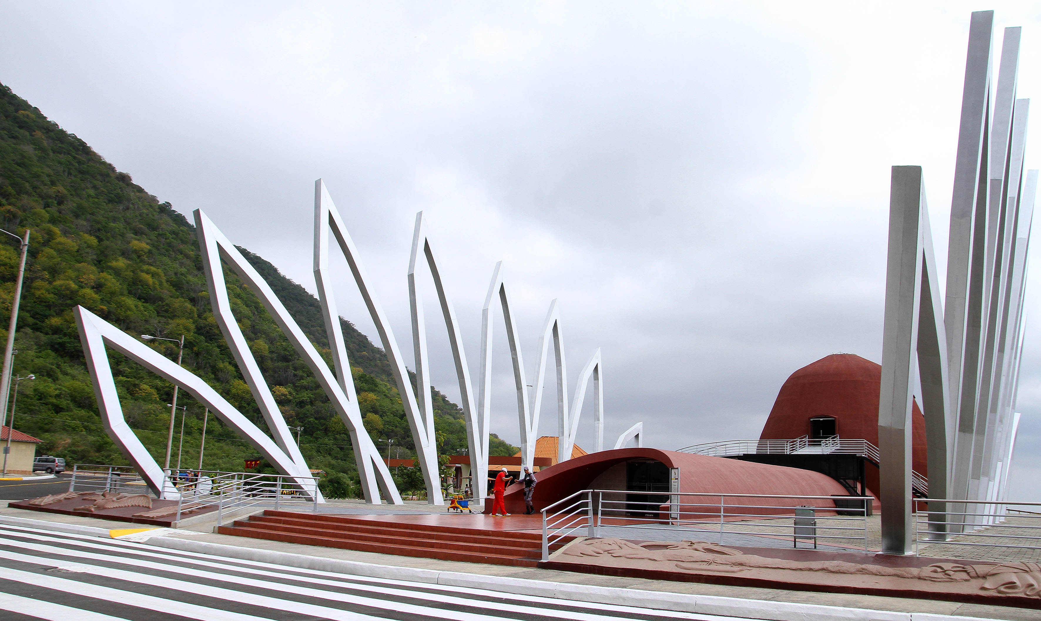 Montecristi, Manabí, 09 de may (Andes).-Al pie del cerro de Montecristi se levanta el Centro Cívico Ciudad Alfaro, la obra que fue presentada en el 2007, es un centro cívico lleno de arquitectura combinada con rasgos de la historia de Manabí y el país. Foto:César Muñoz/Andes